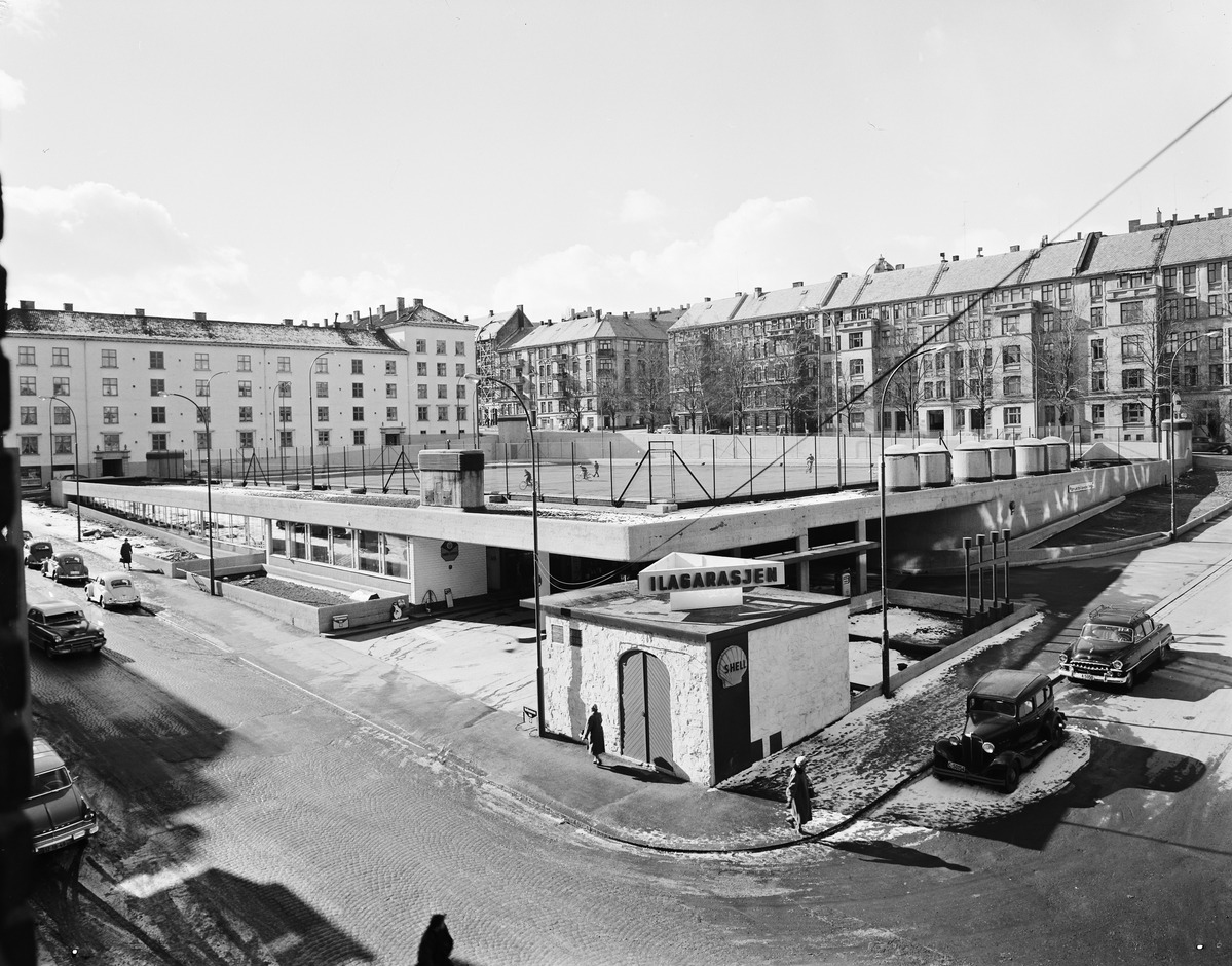 Falck Ytters plass med Ilagarasjen under